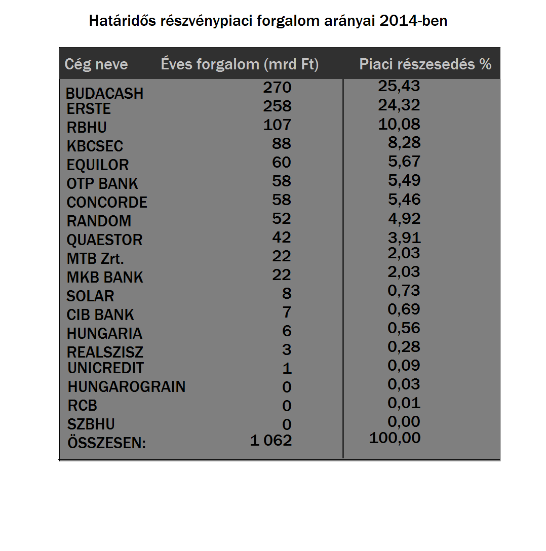 A határidős részvénypiac megoszlása 2014-ben. Az adatok a [1] oldalról származnak.